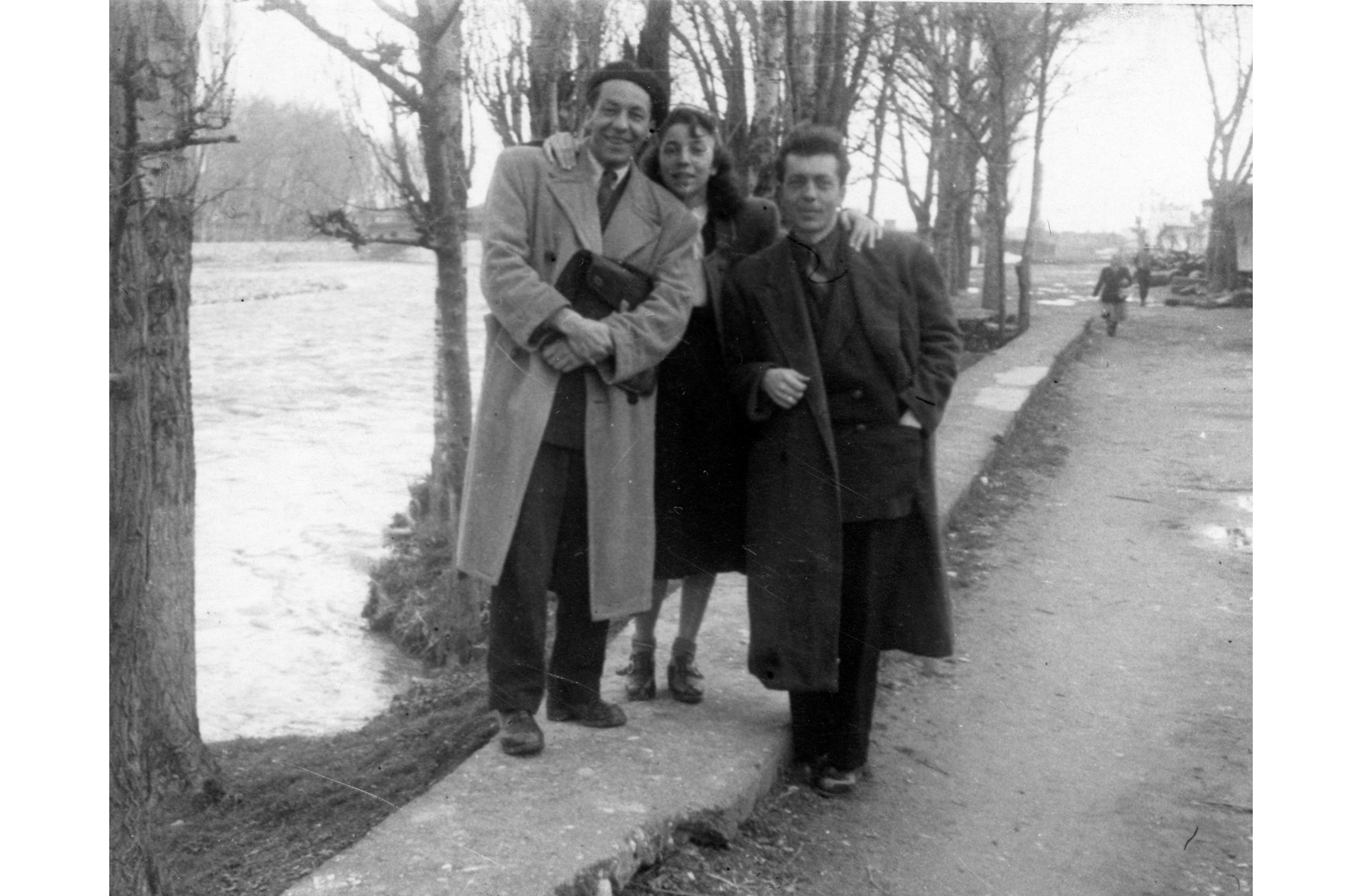 Янко Ганев със сестра си Райна Ганева и брат си Георги Ганев на брега на р. Марица, Пловдив